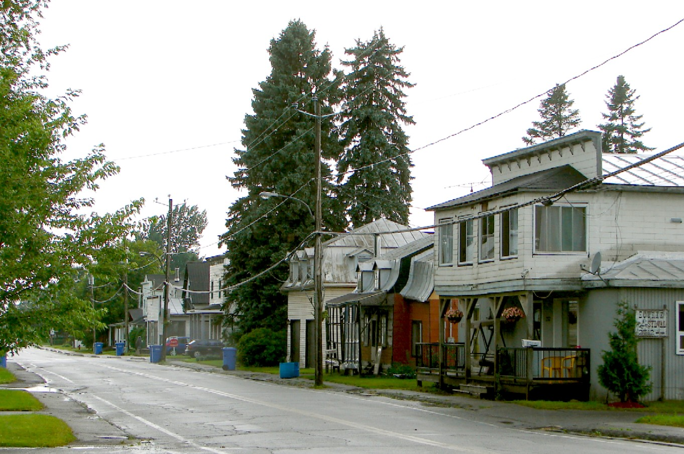 Sainte-Justine-de-Newton, Quebec, Canada